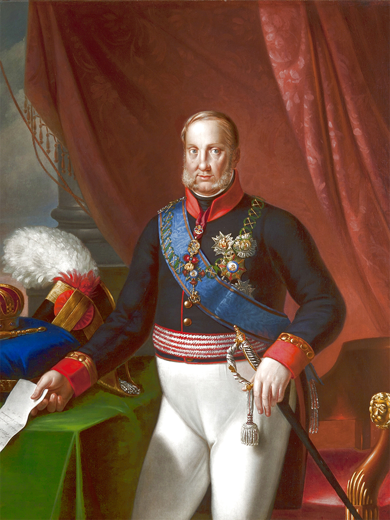 Ritratto di Francesco I delle Due Sicilie (1777-1830)